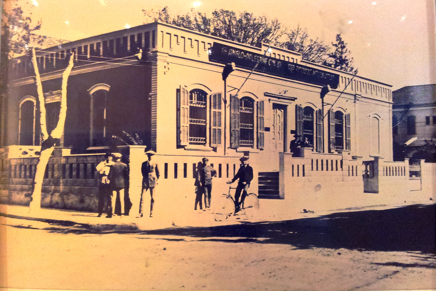 תצלום מבנה בנק אפ"ק בתל אביב בשנות ה-20 של המאה ה-20, המוצג במבואות מגדל שלום